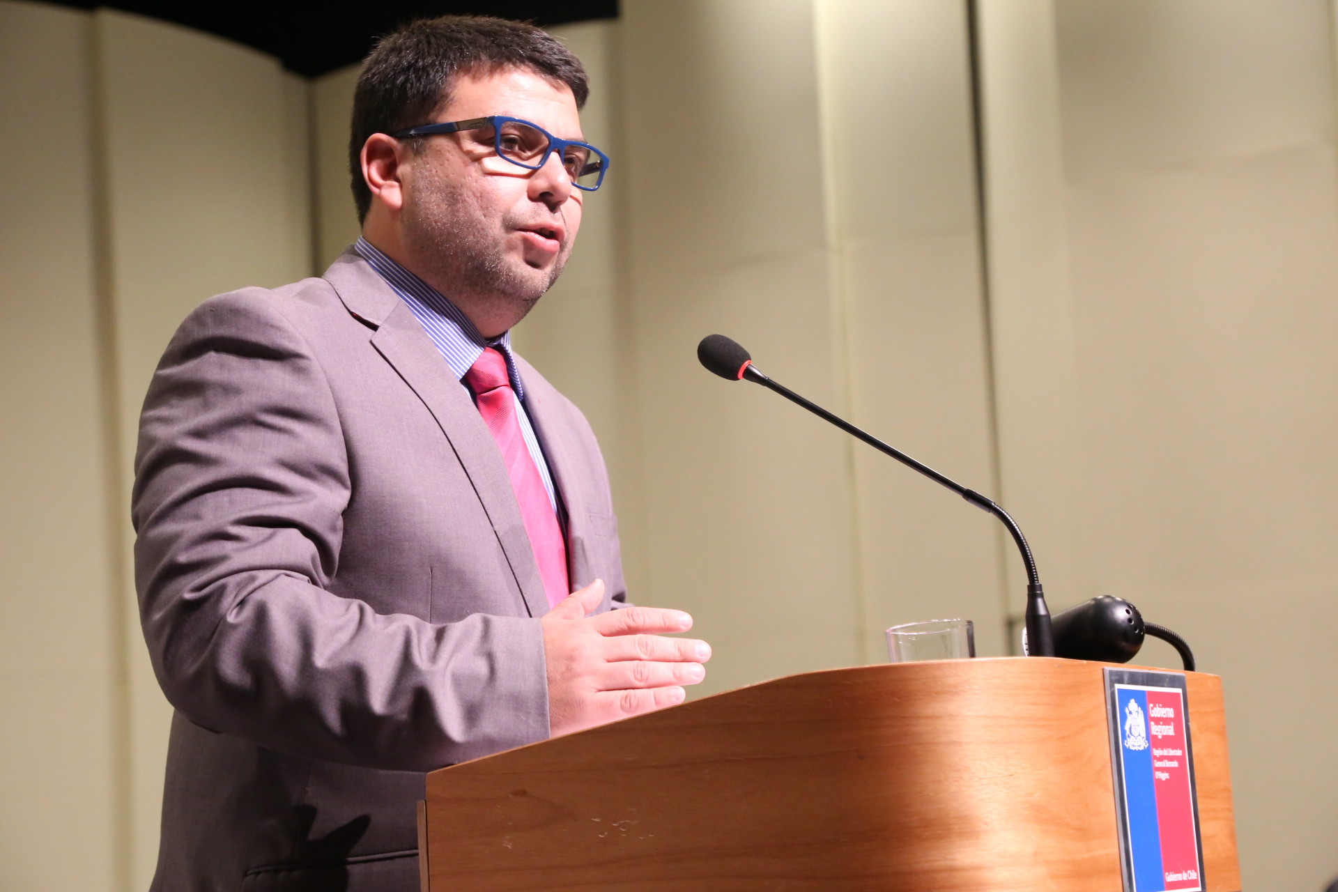 Juan Ramón Godoy asumió como nuevo Intendente de la Región de O’Higgins